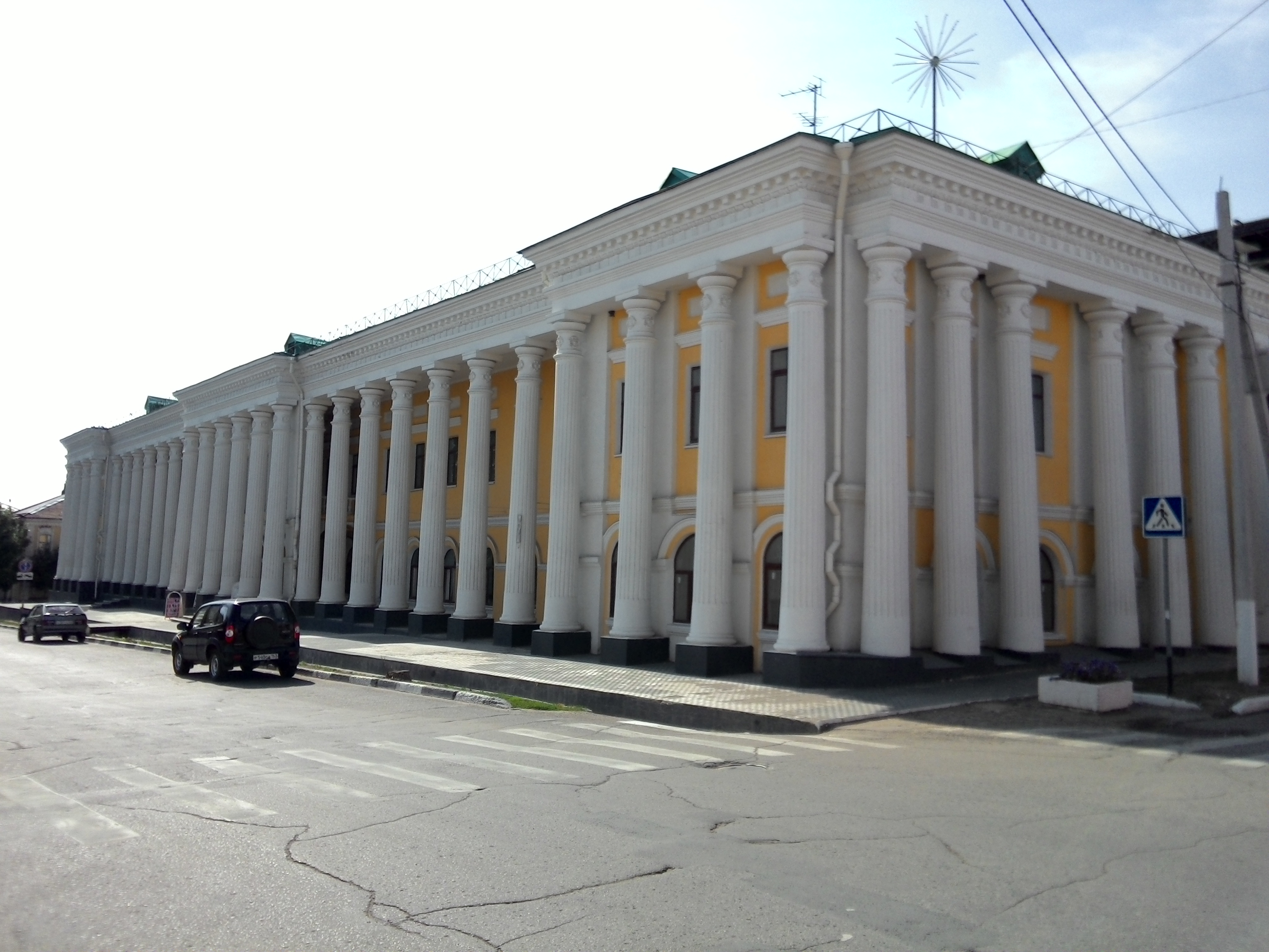 Здание Гостиного двора: улица Коммунистическая, 9, Вольск, Саратовская область